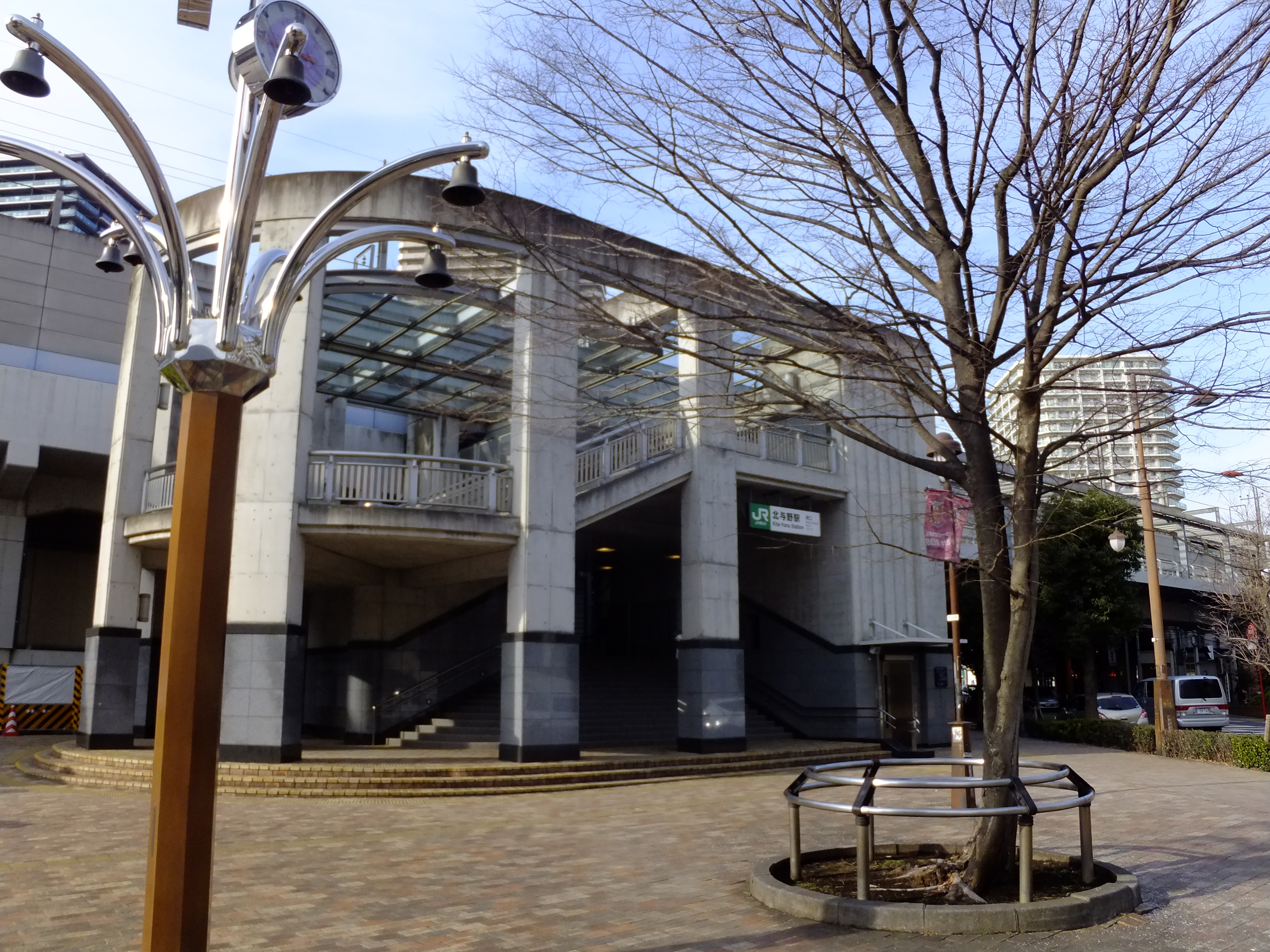 埼京線・北与野駅南口